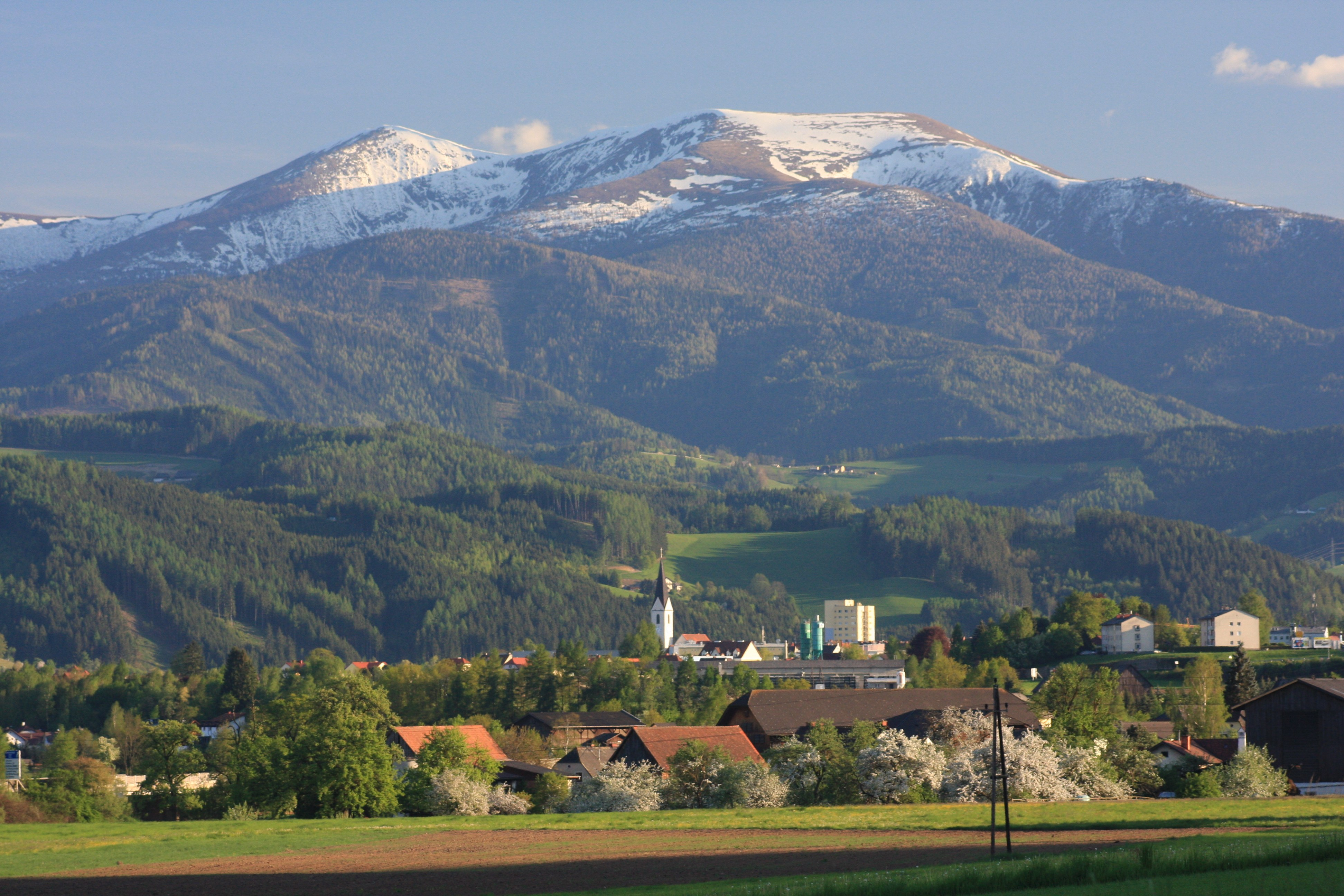 Blick Richtung Süden auf Knittelfeld